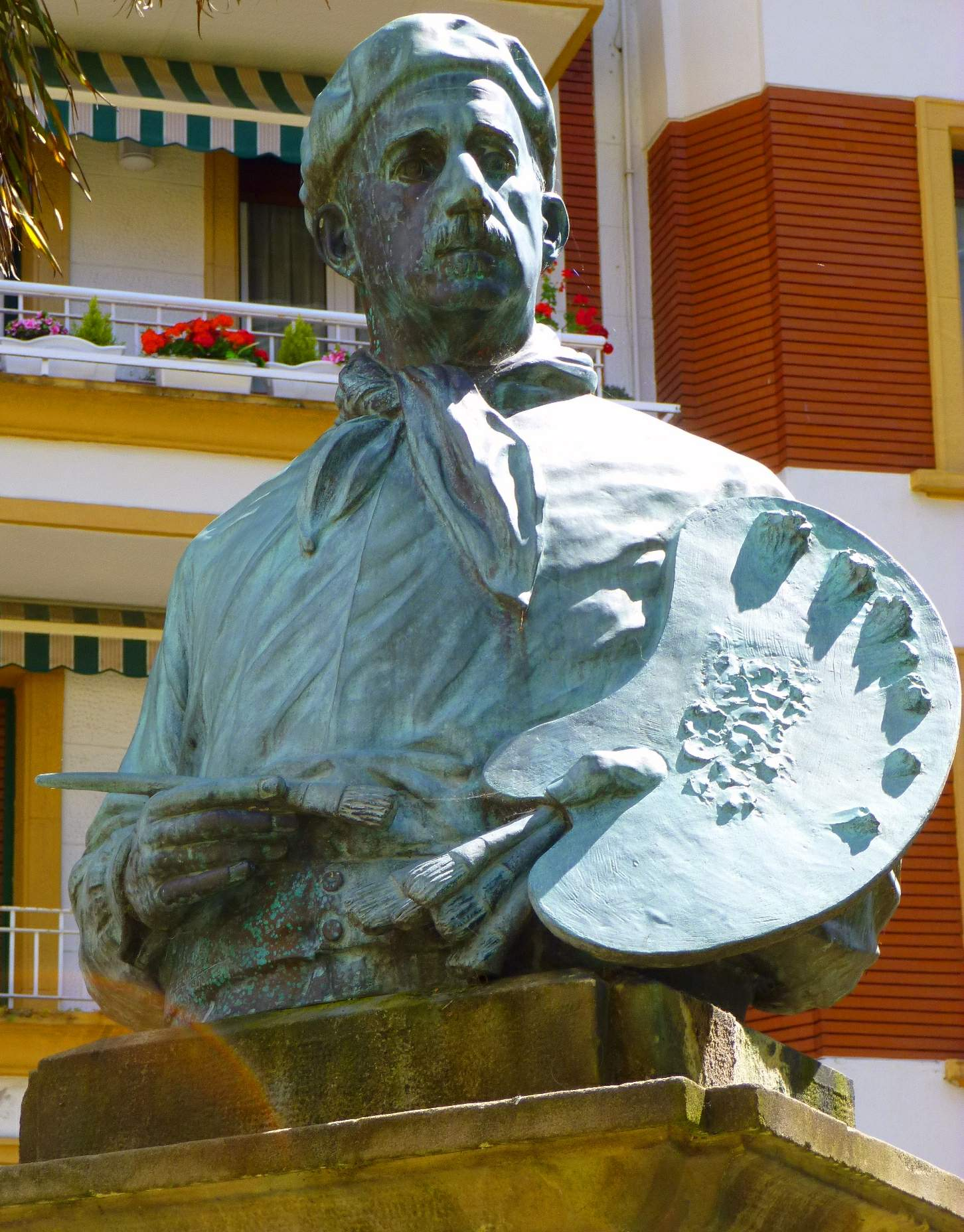 Monumento al pintor Ignacio Zuloaga (Eibar, Guipúzcoa)